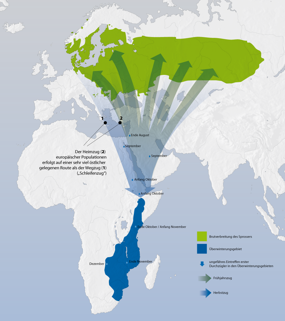 Verbreitung und schematisierte Zugrouten des Sprossers (Luscinia luscinia)